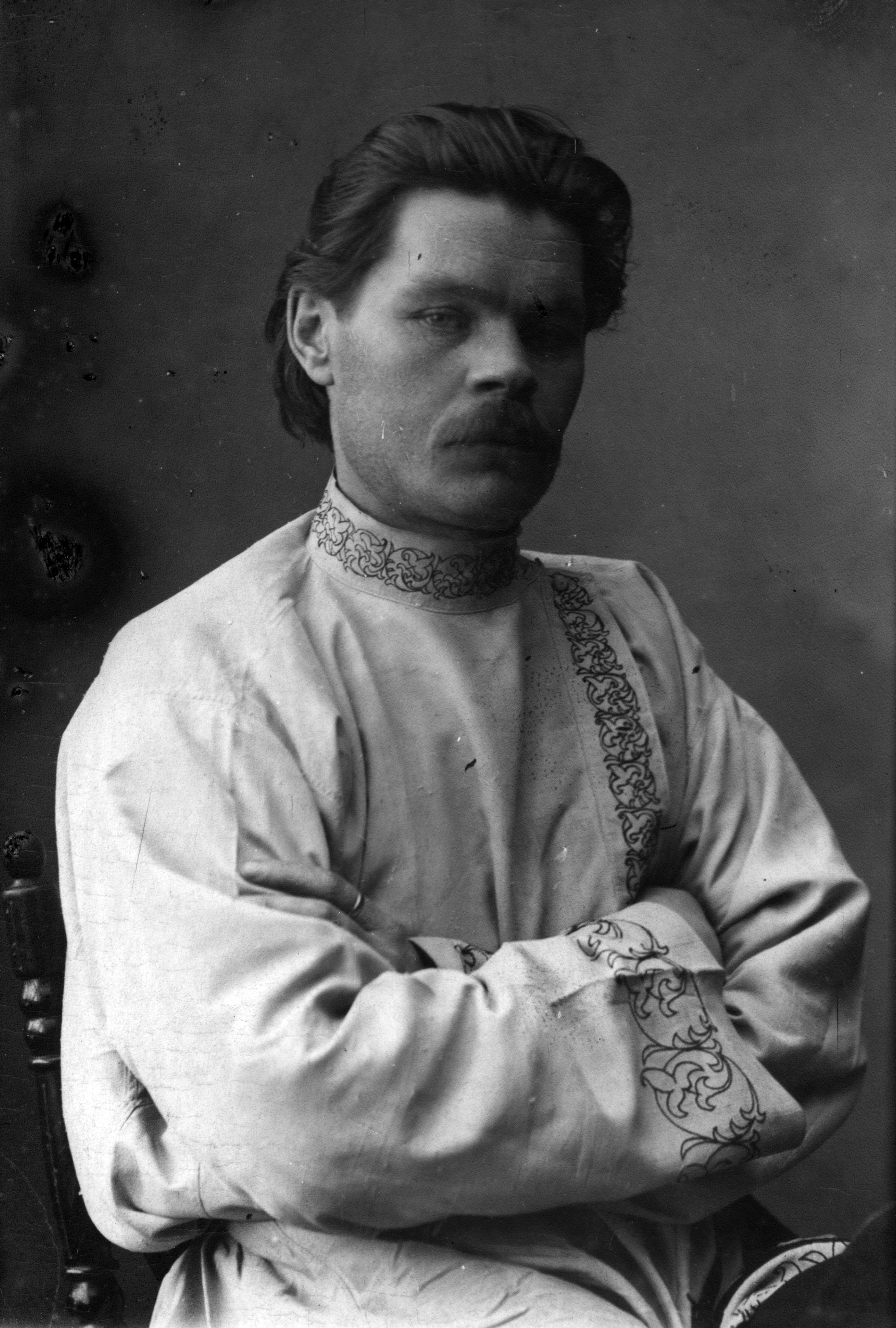 Максим Горький в белой косоворотке